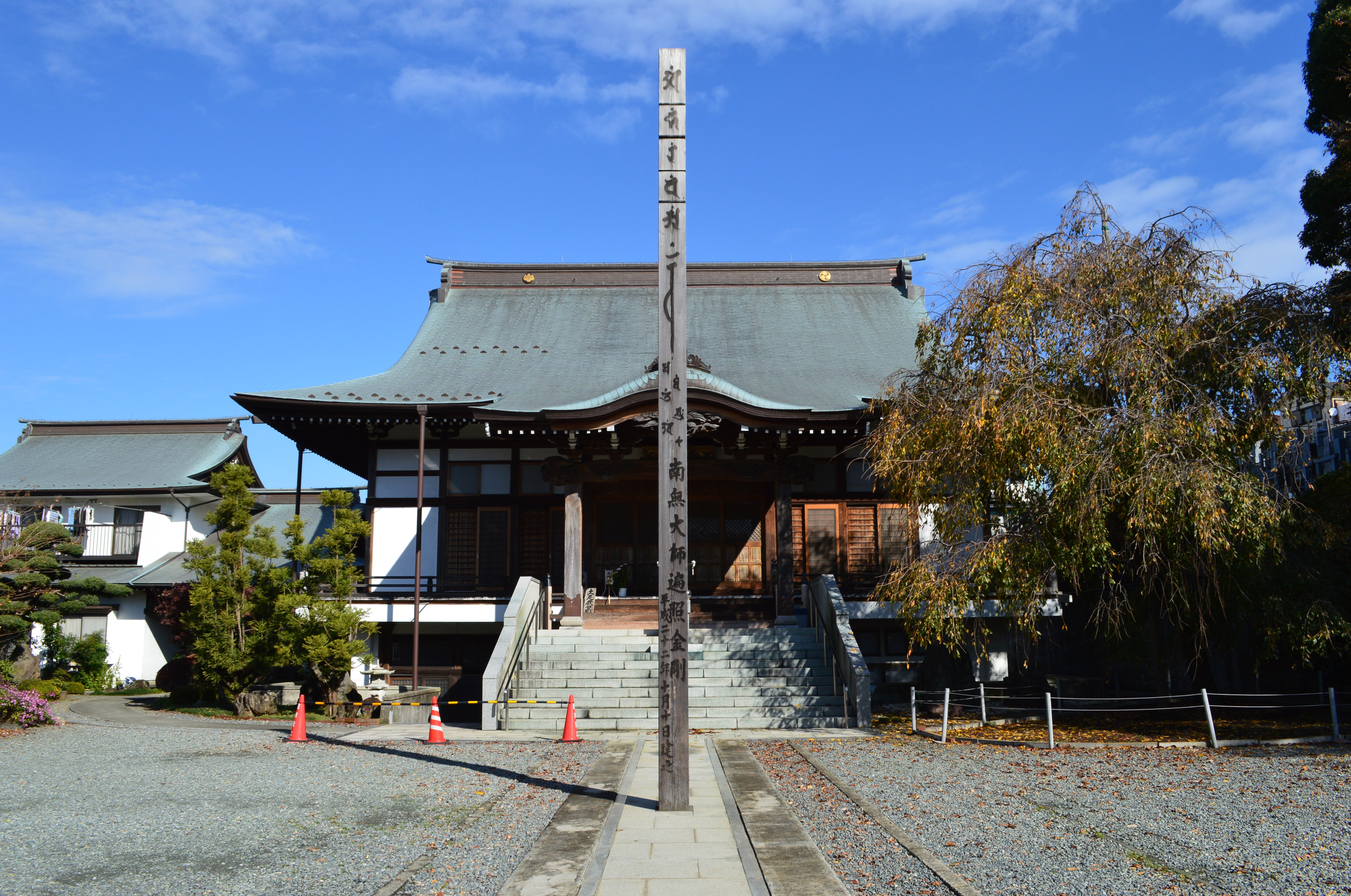 相模国分寺 本堂